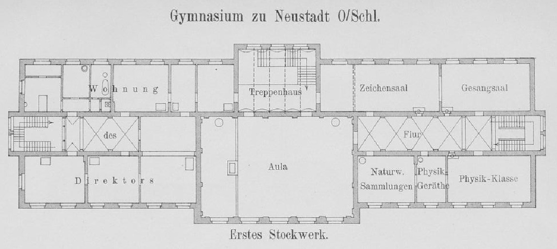 Rzut 1 piętra